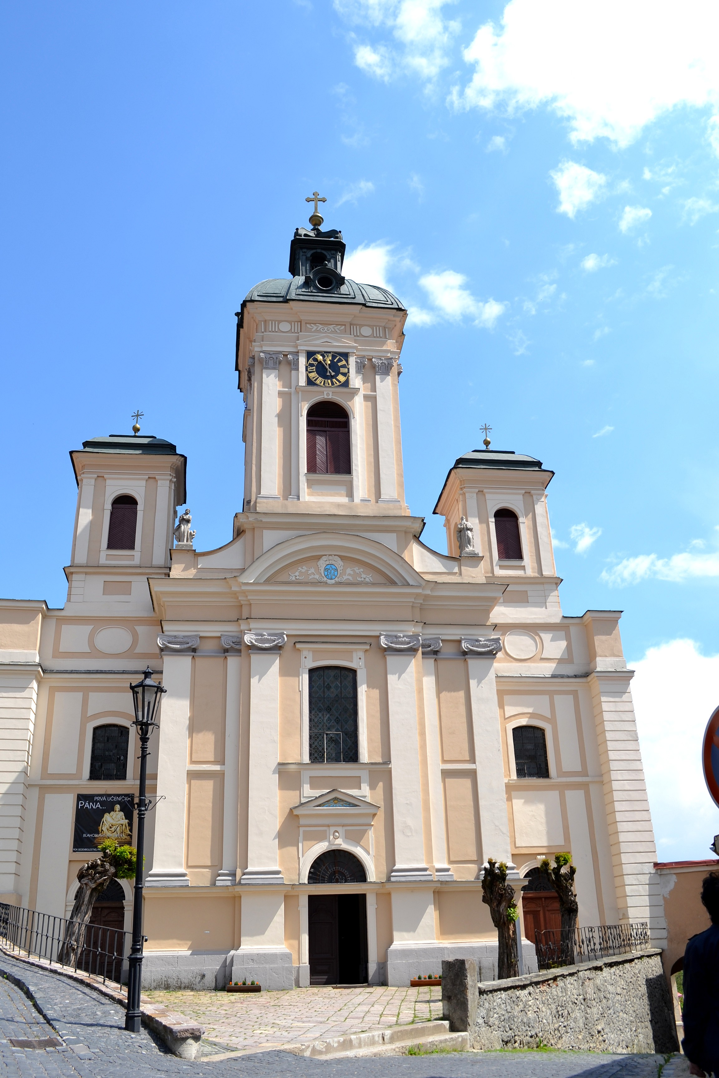 Banská Štiavnica. Priečelie farského Kostola Nanebovzatia Panny Márie